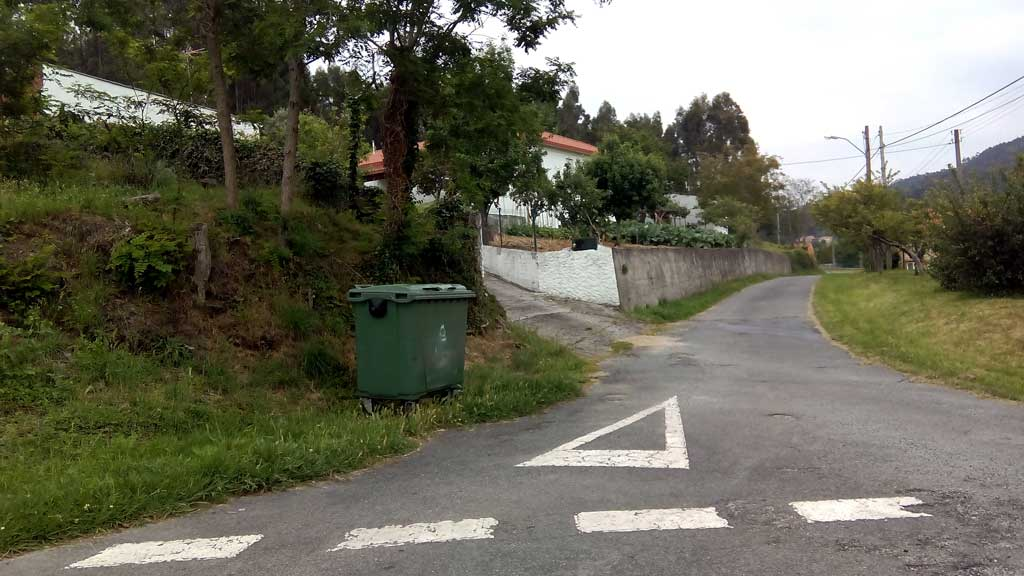 Vista de Esmelle.